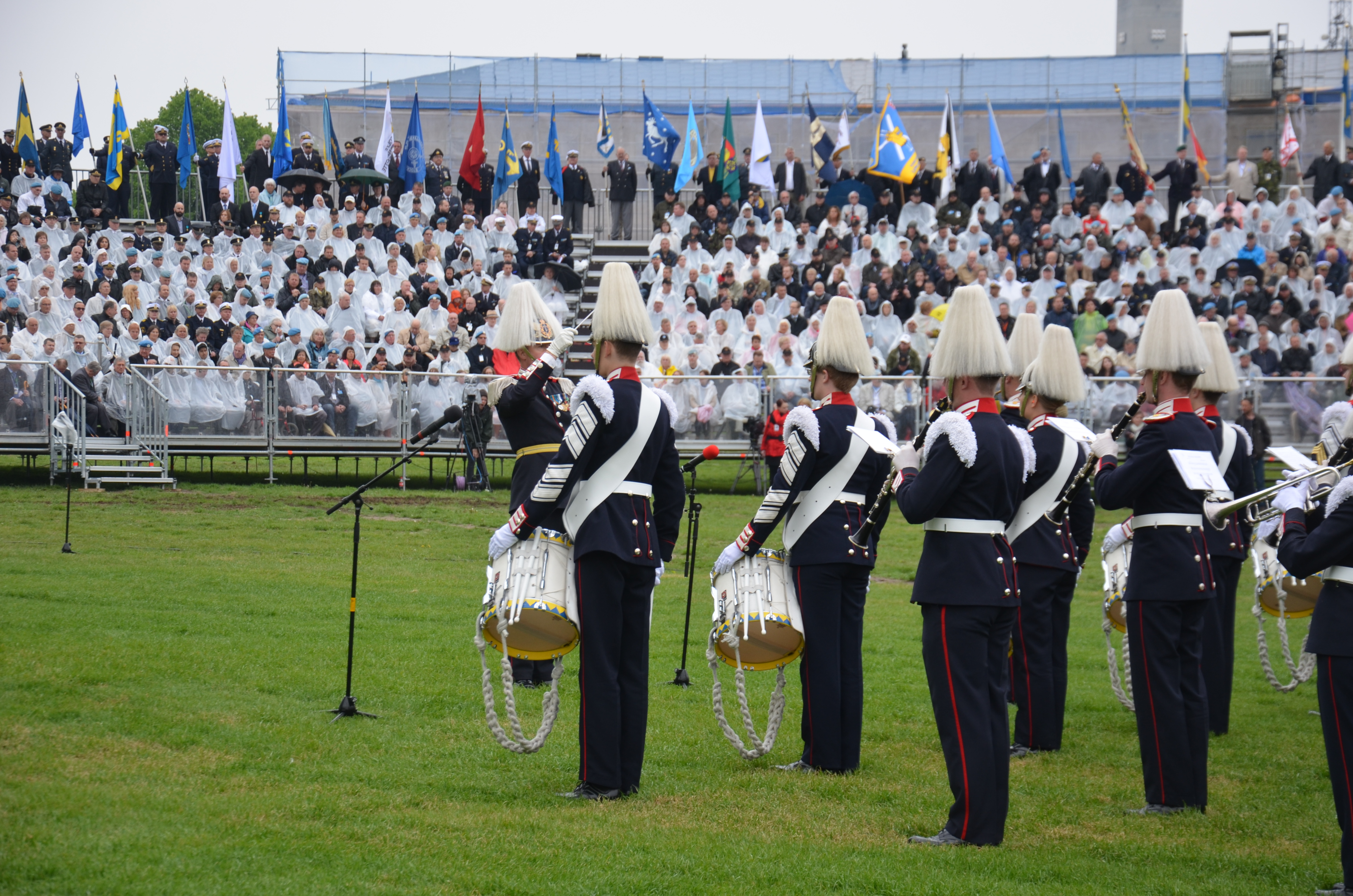 Veterandagen 29 maj 2013, mot hedersläktaren från sydväst